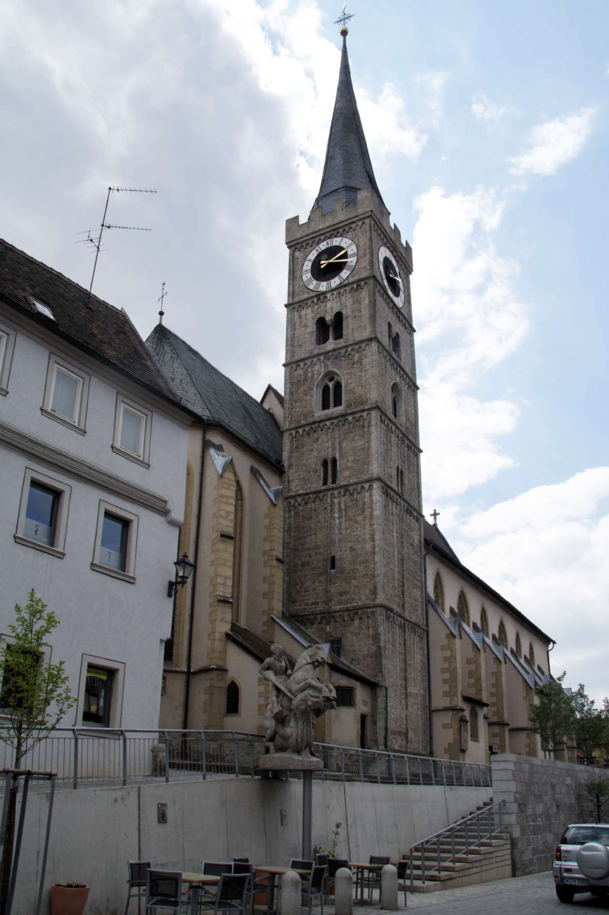 Ochsenfurt, St. Andreas, Norsseite an der Hauptstraße, davor das Kriegerdenkmal